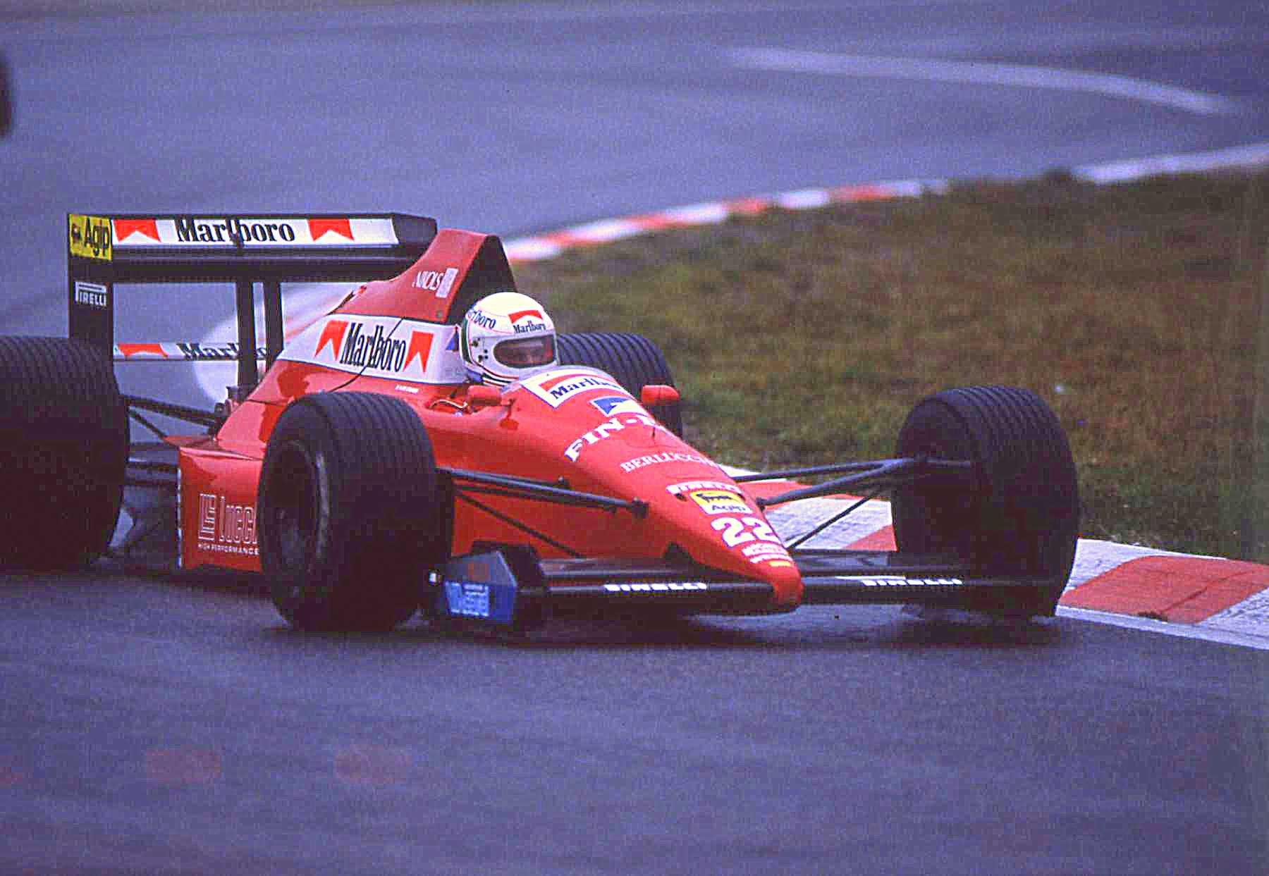 Andrea de Cesaris - BMS Dallara-Ford - Scan de Diapo argentique.